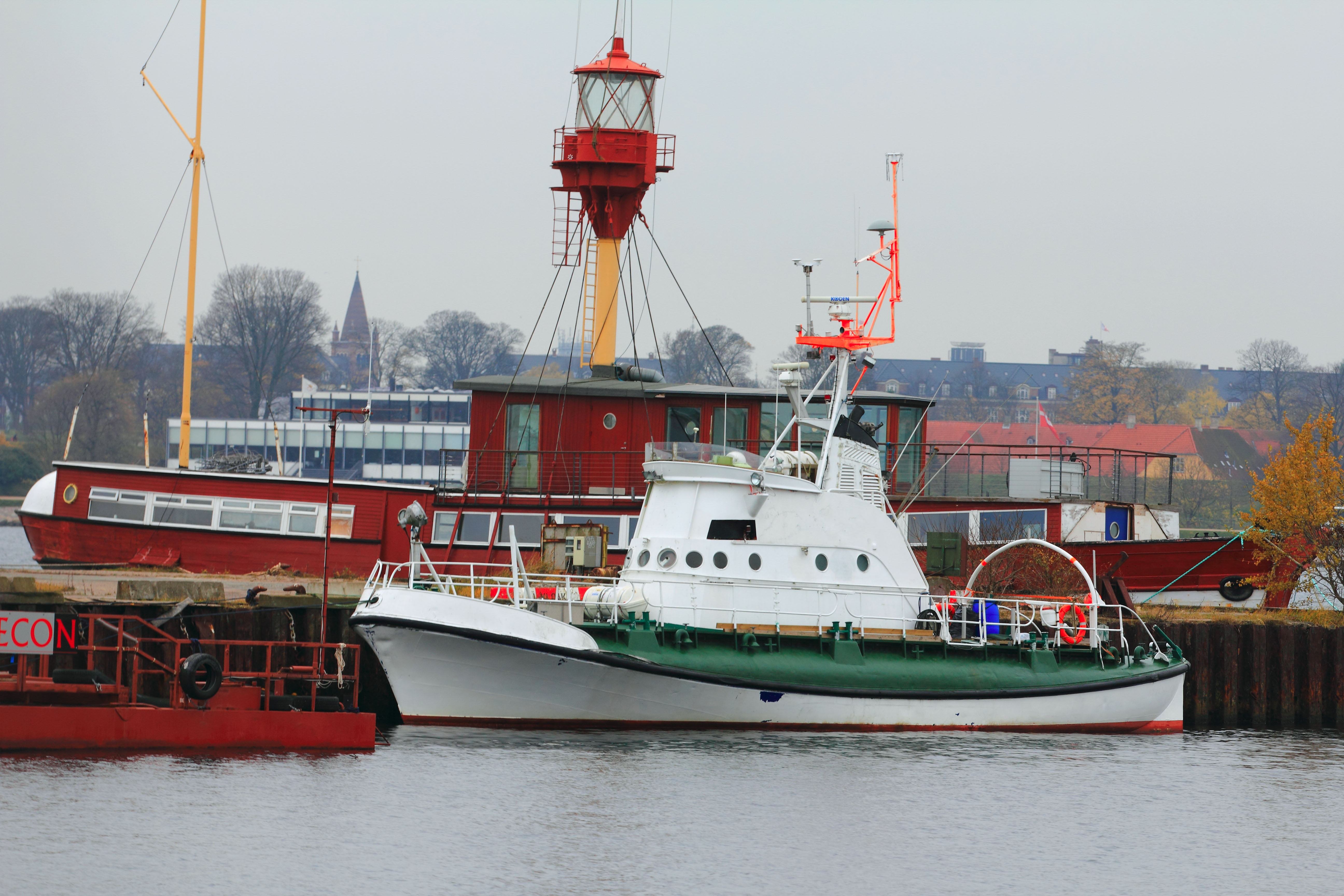 Vostok011.jpg